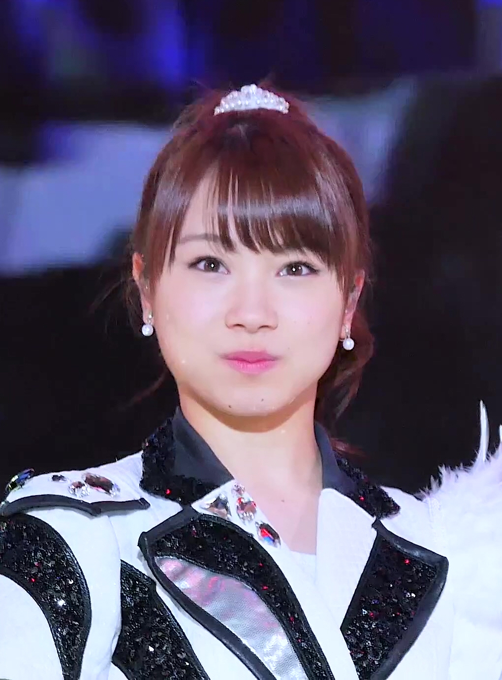 161006 AMN 빅 콘서트 - 마키노 마리아 모닝구무스메 메들리 직캠